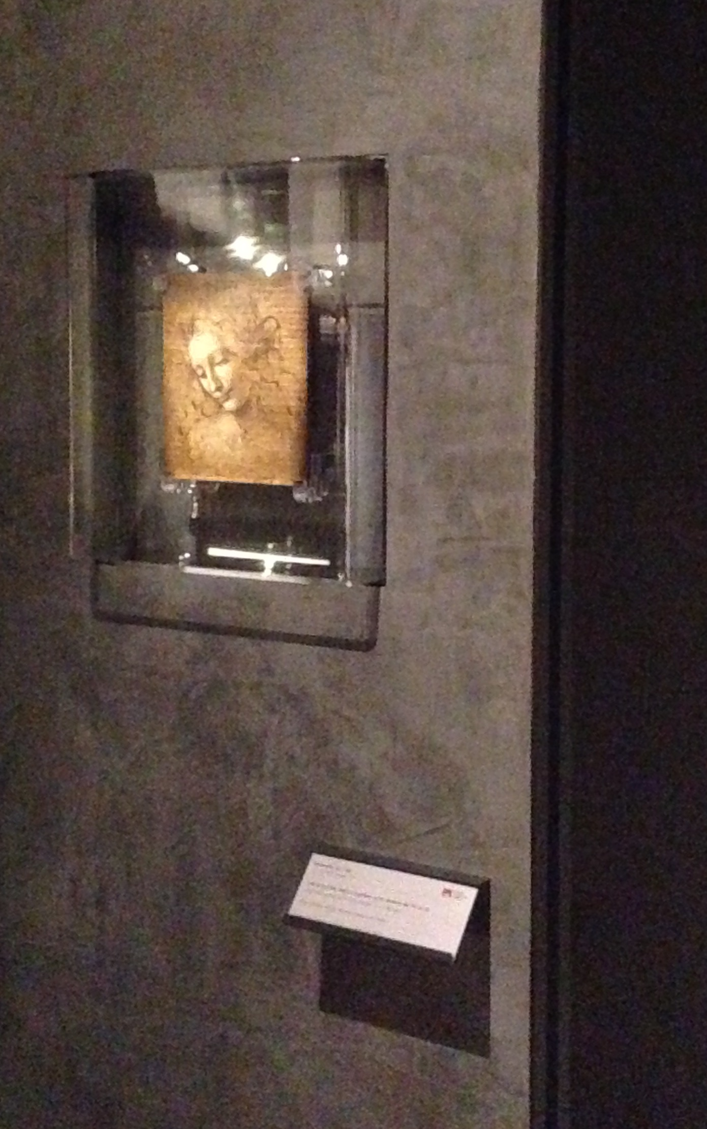 La scapigliata di Leonardo Da Vinci presso la galleria Nazionale di Parma